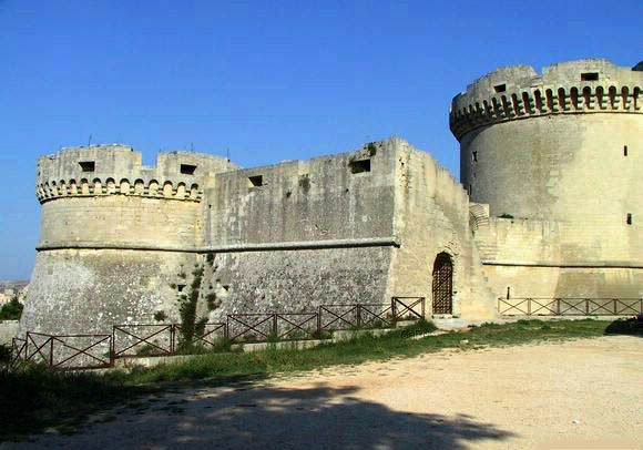 Il Castello Tramontano a Matera il 4 agosto del 2002 (era domenica e fu una gran bella giornata)